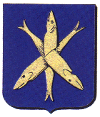 Wapen gemeente Zandvoort